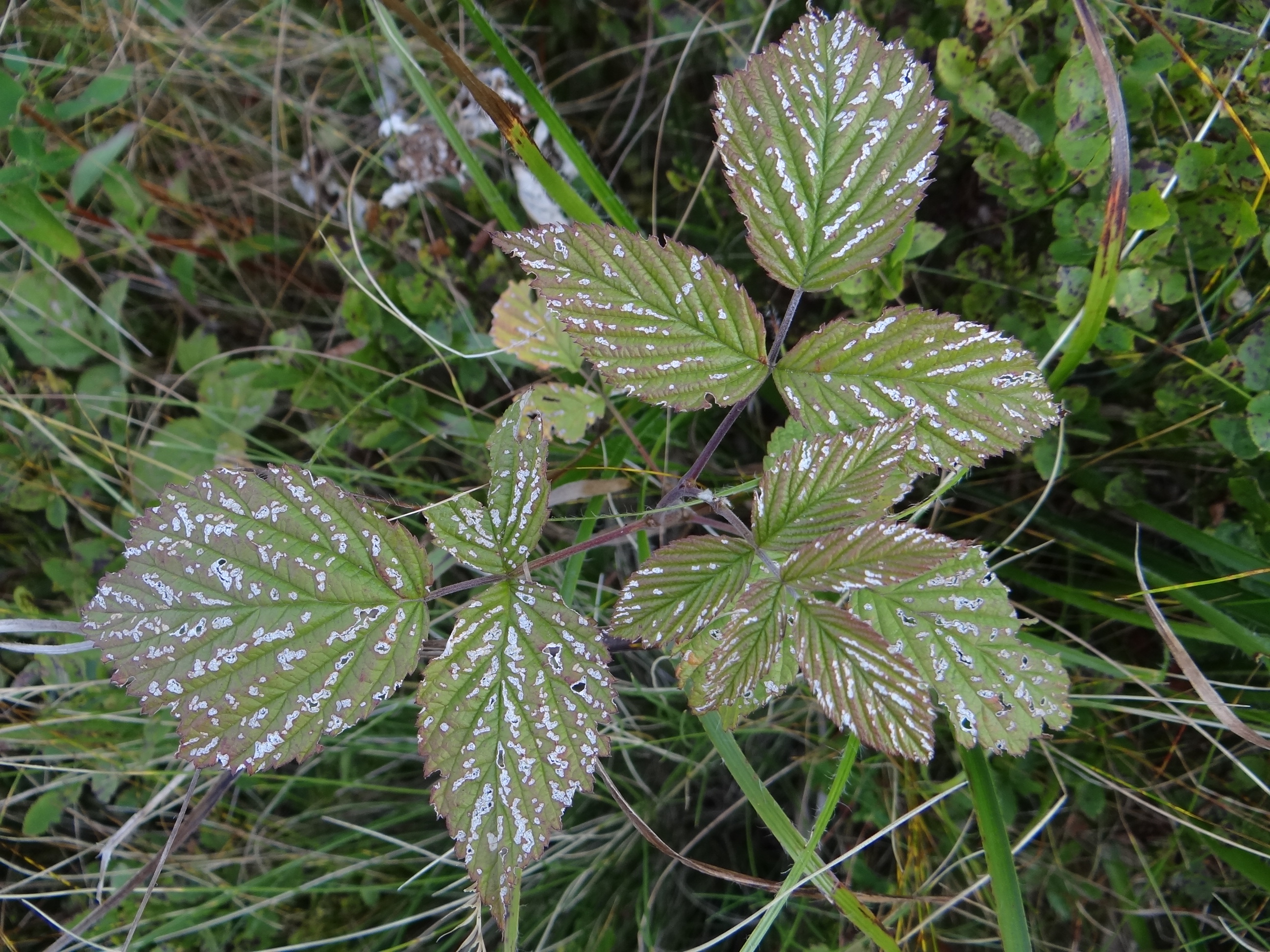 Mycosphaerella rubi on Rubus idaeus